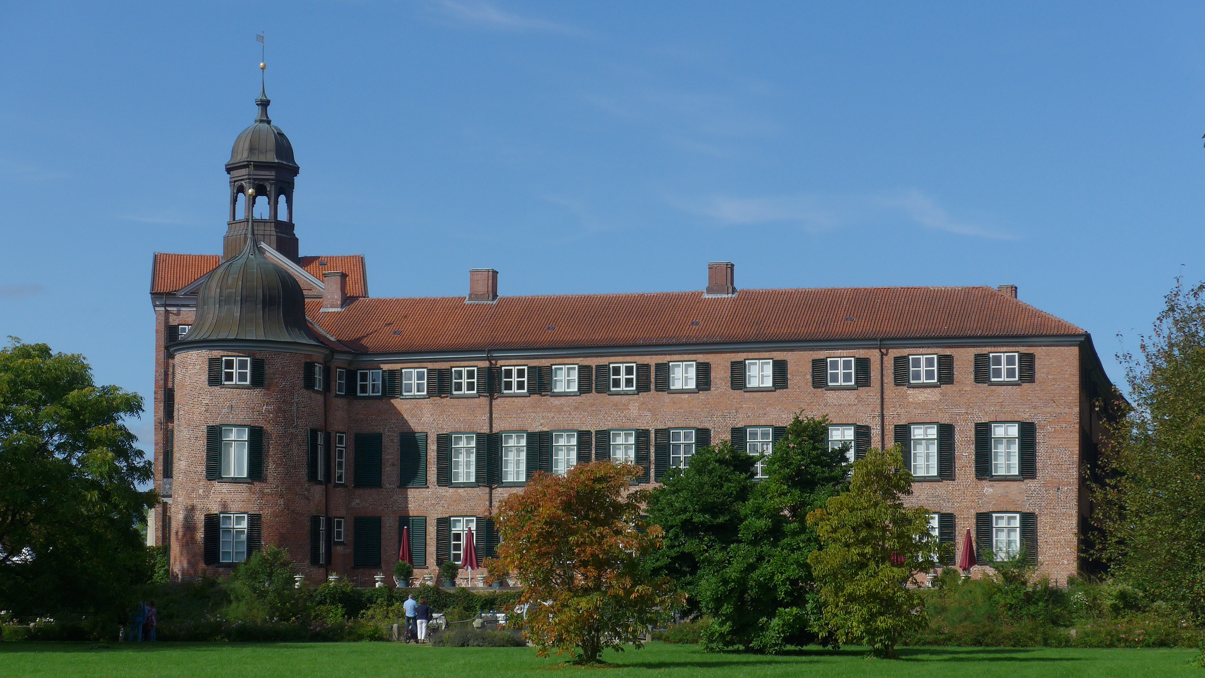 Das Eutiner Schloss vom Schlossgarten aus gesehen